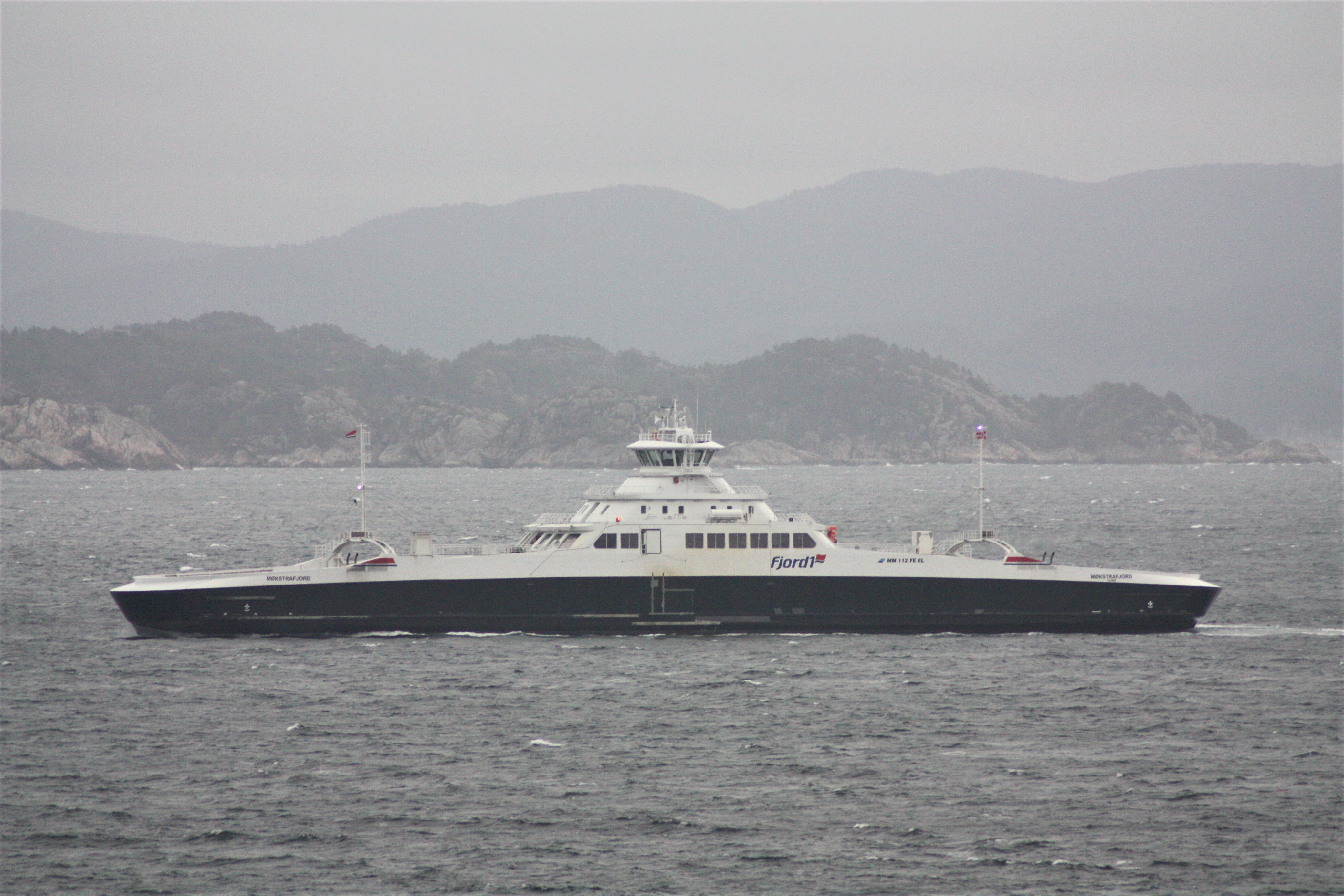 «Møkstrafjord» i Korsfjorden